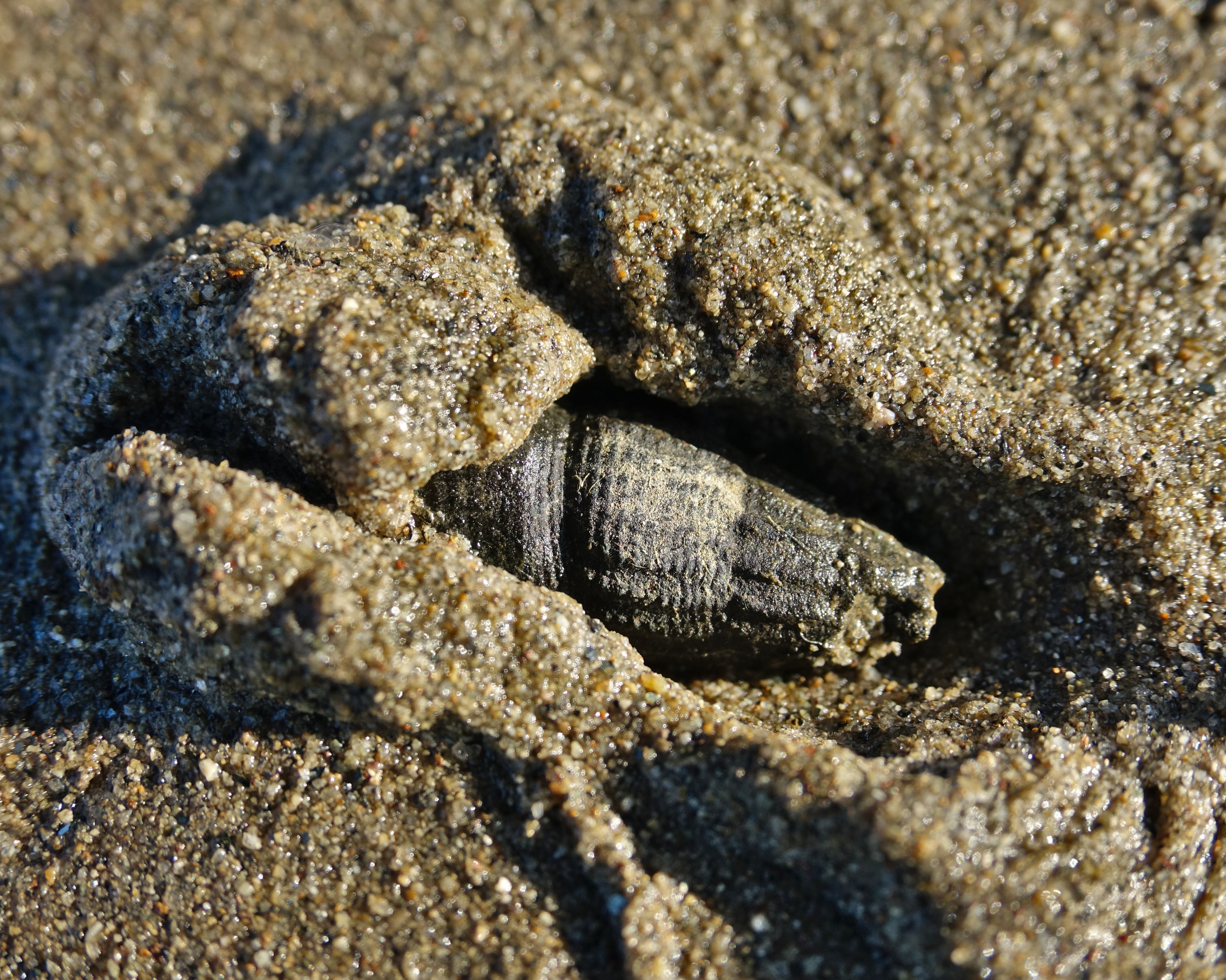 チリメンカワニナ 日本、東海地方